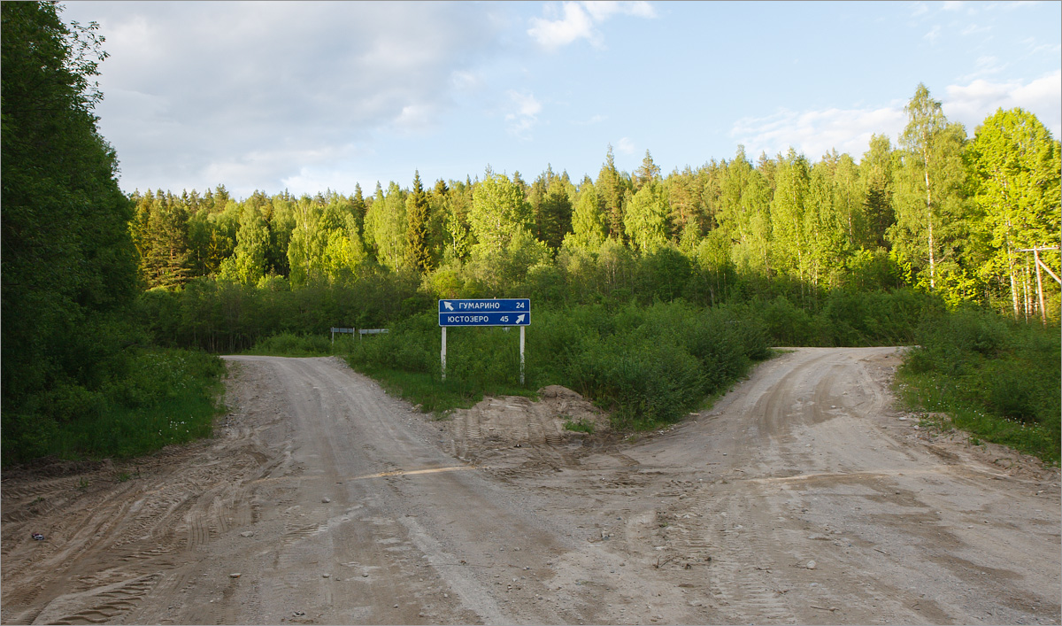 Развилка на дороге регионального значения Суоярви - Юстозеро (через Поросозеро) - Медвежьегорск (Автодорога 86К-14). Поворот на посёлок Гумарино.